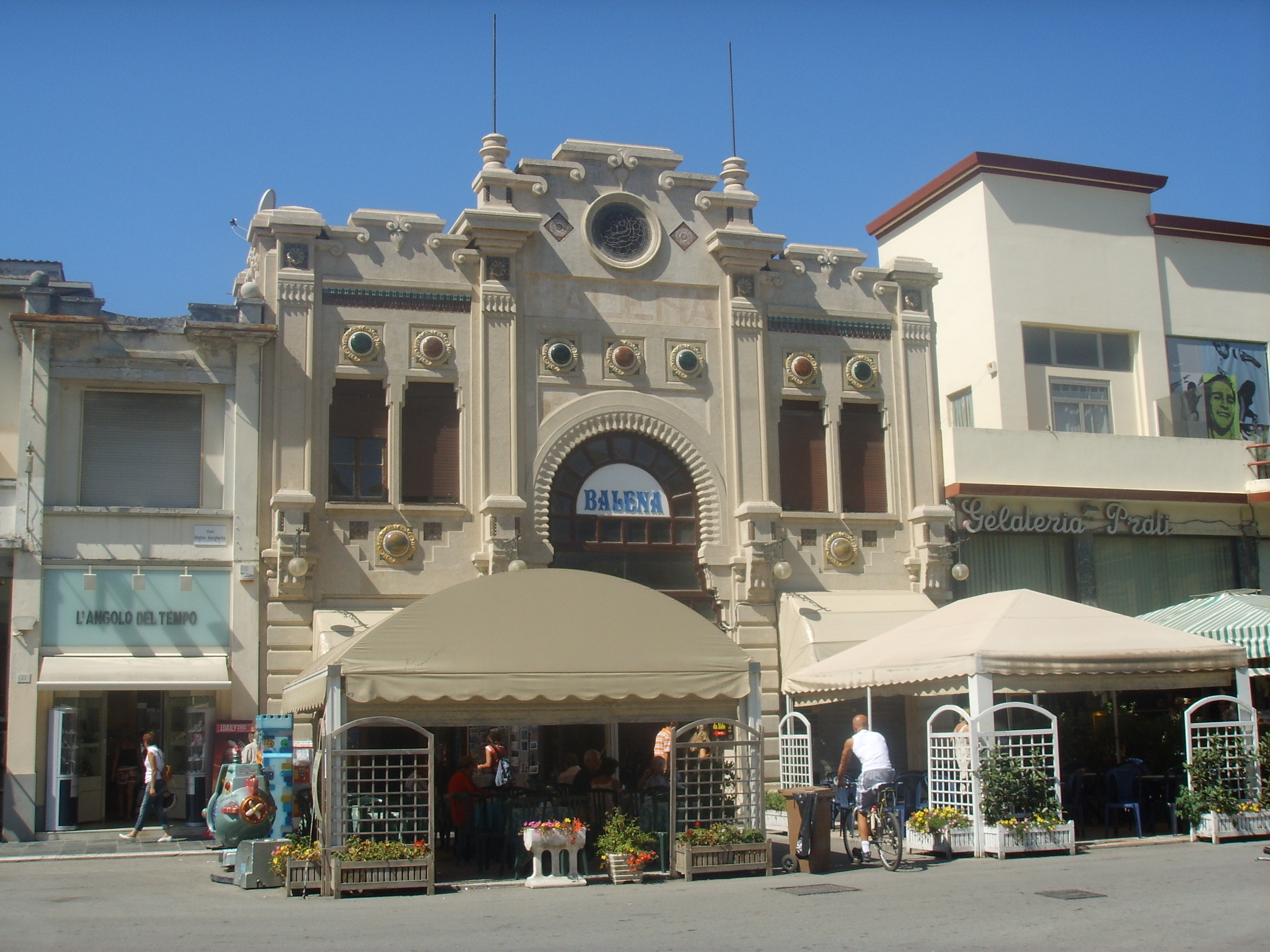 Viareggio, Bagno Balena in Viareggio, italy